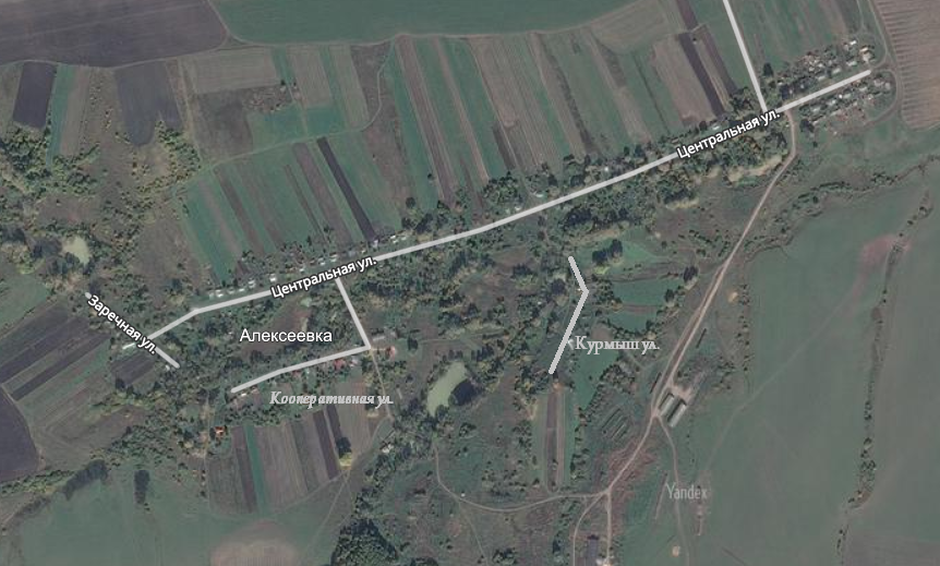 улицы в алексеевке